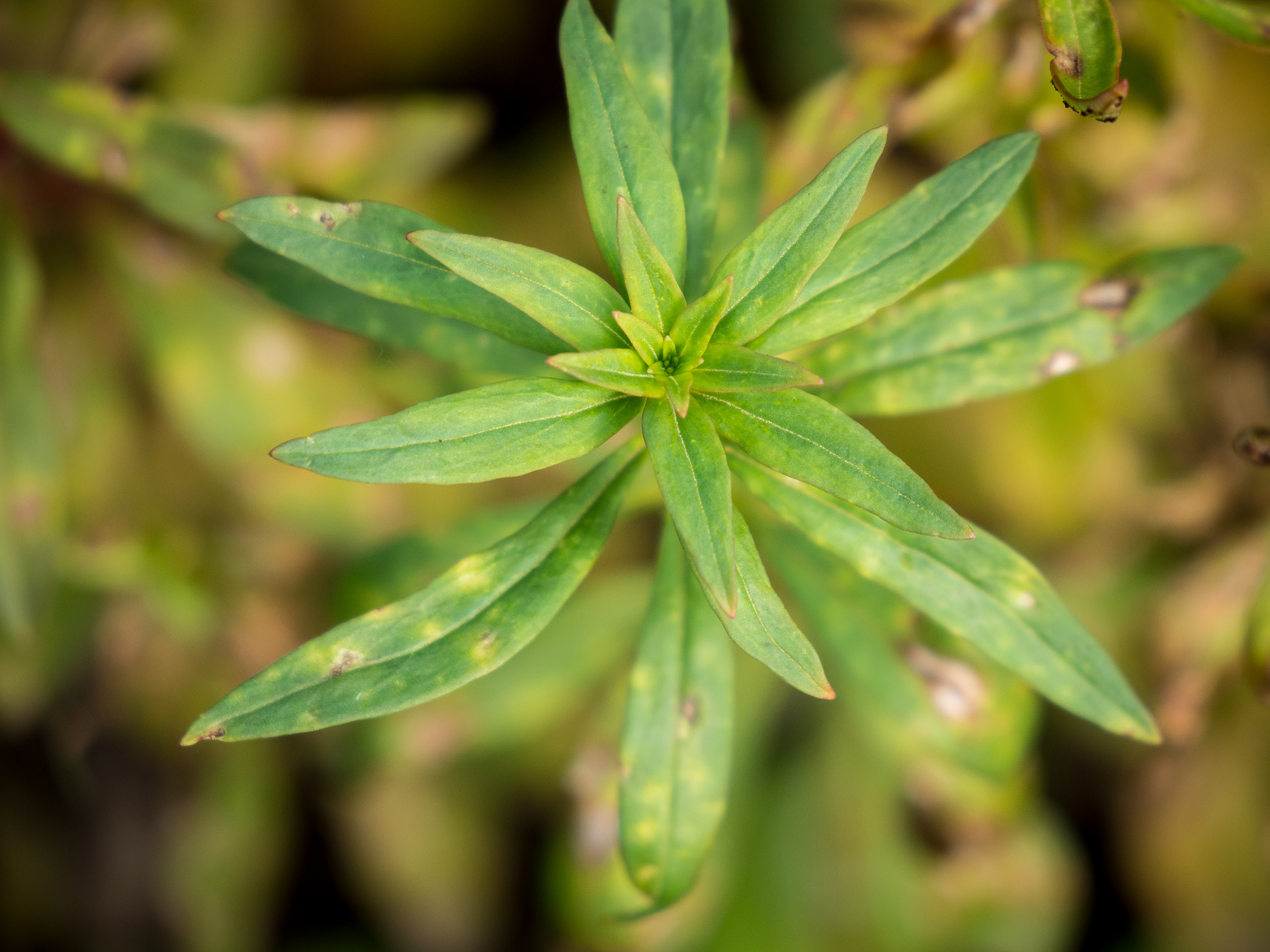 Das Große Löwenmaul (Antirrhinum majus) oder Garten-Löwenmaul